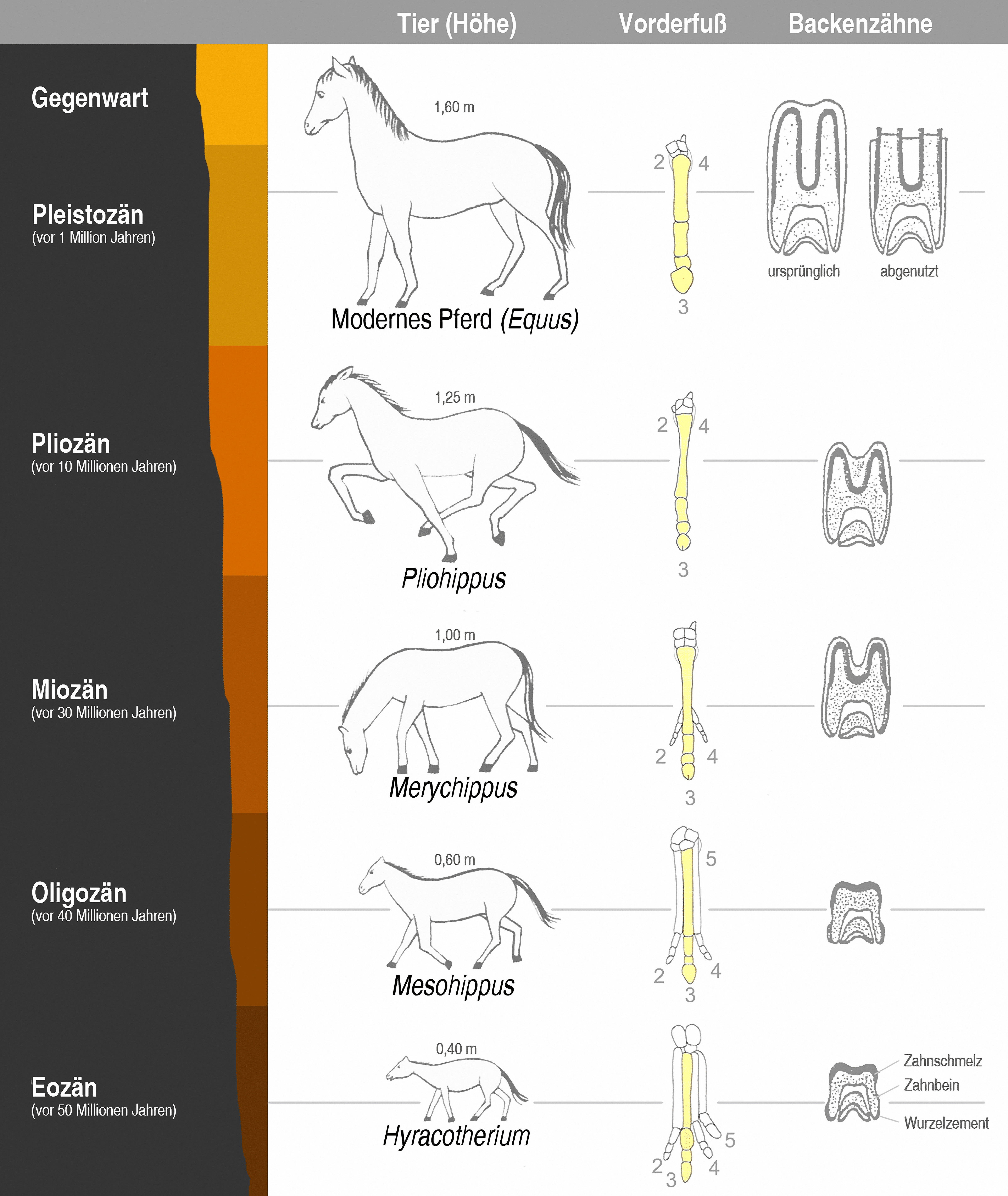 Bild basiert auf Image:Horseevolution.png von User:Mcy jerry, Übersetzungen von Benutzer:Bradypus